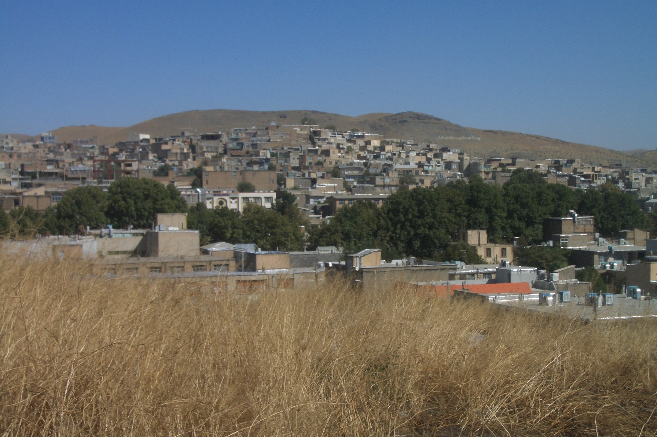 Blick vom Anahita-Tempel